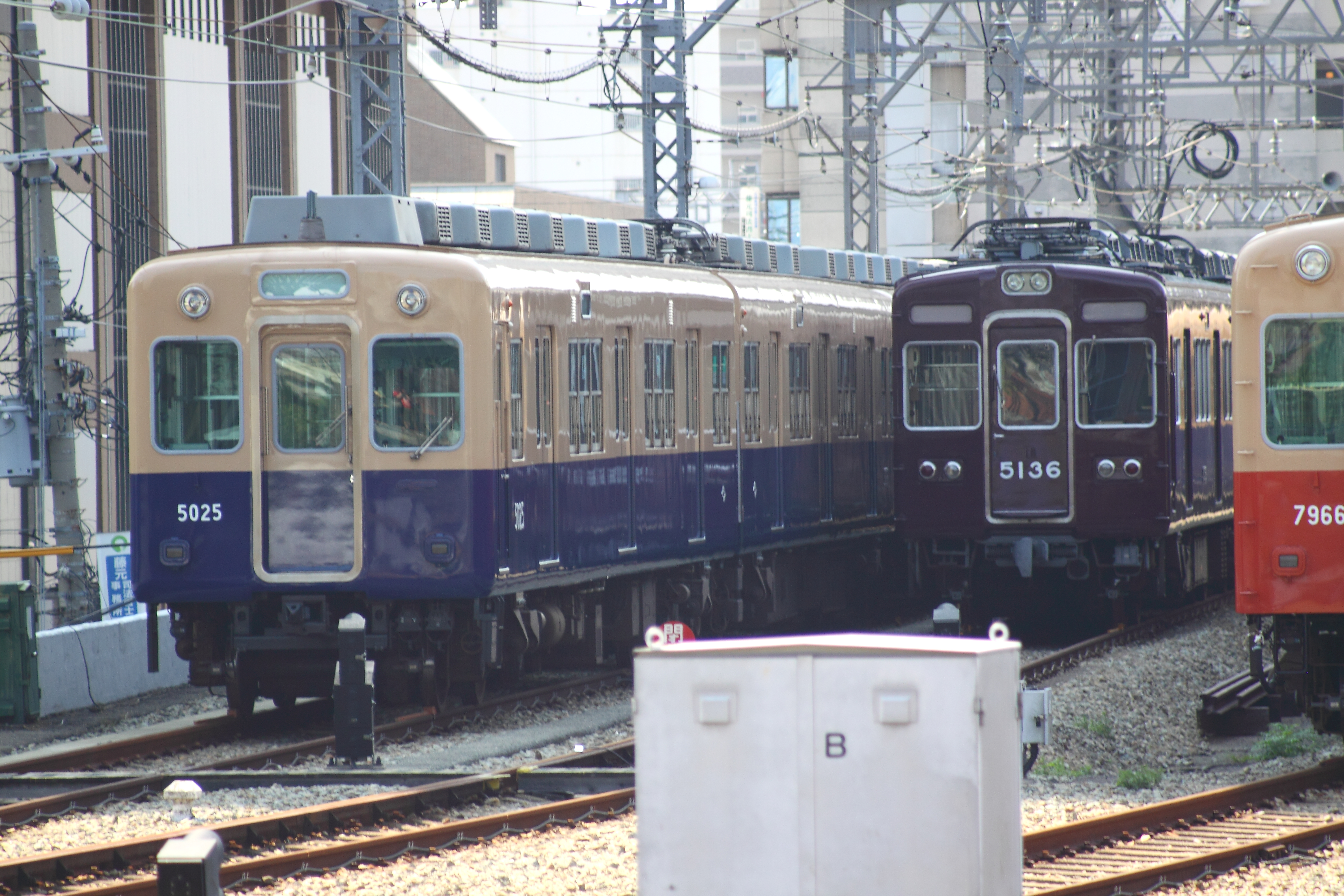 阪急5100系 5136F 阪神尼崎駅に留置